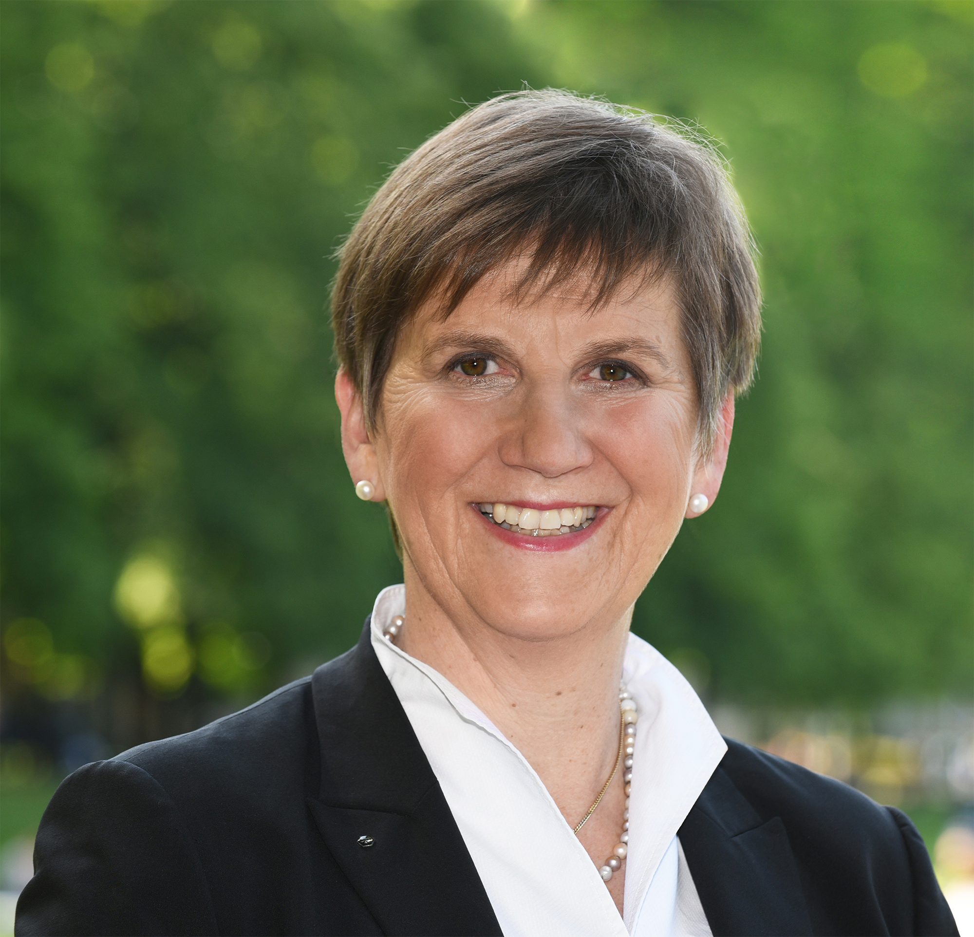 Portraitfoto der Bundestagsabgeordneten Dr. Claudia Lücking-Michel